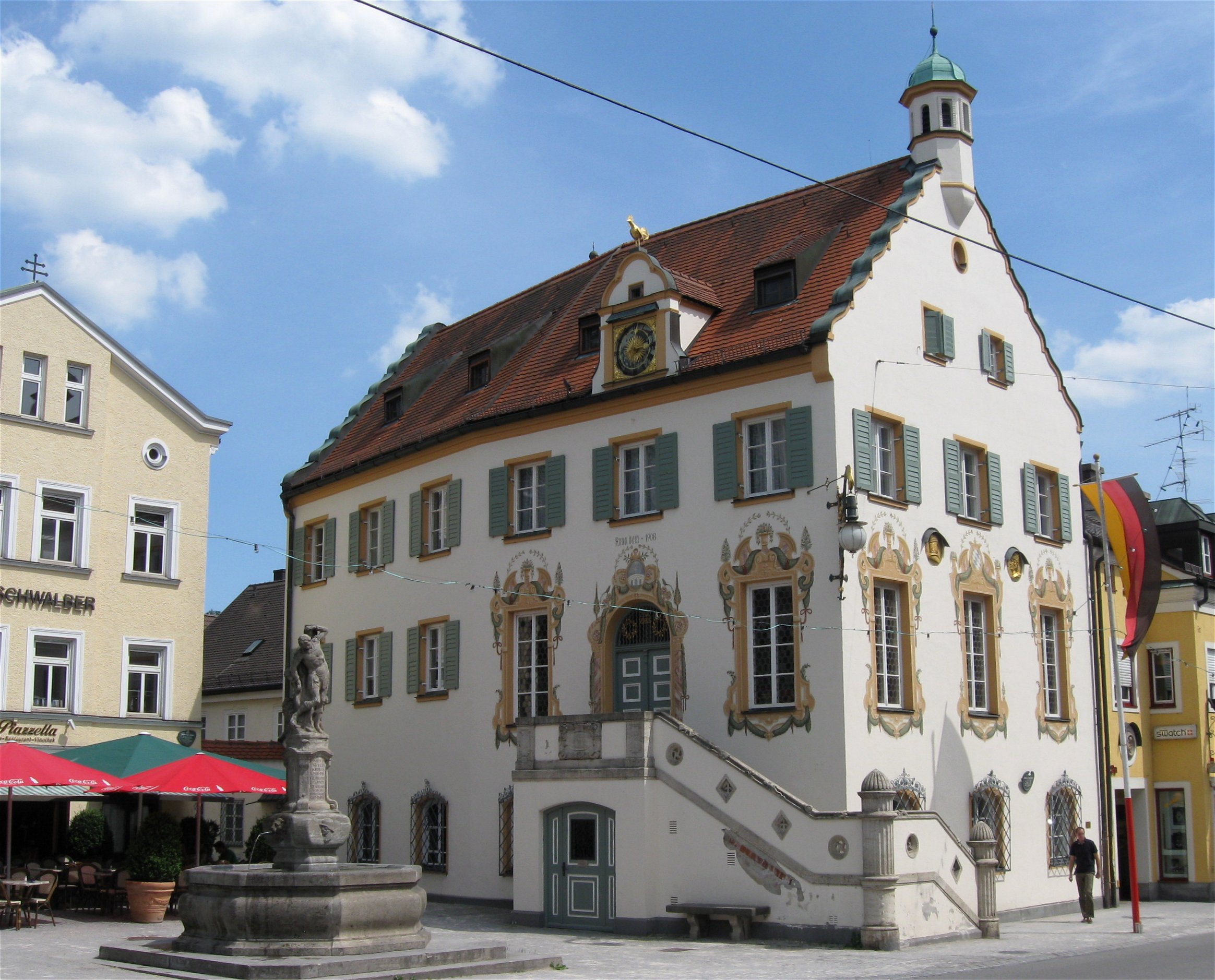 Hauptstraße 4. Altes Rathaus, dreigeschossiger Giebelbau mit Freitreppe und Giebelreiter, 1866/68 von Johann Marggraff aus einem Bürgerhaus des 18. Jhs. umgebaut.